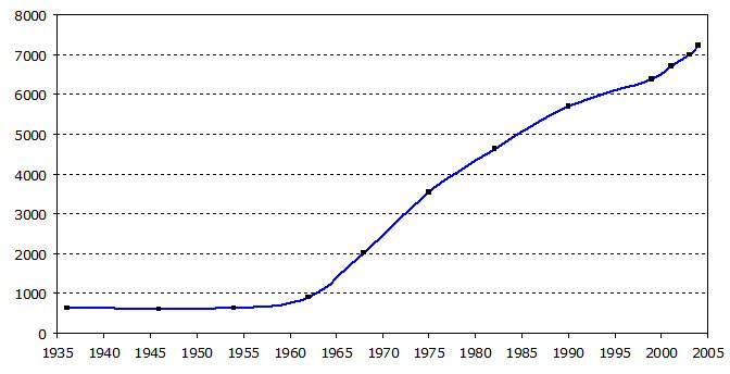 Evolution de la population de Saint-Genis-Pouilly depuis 1936